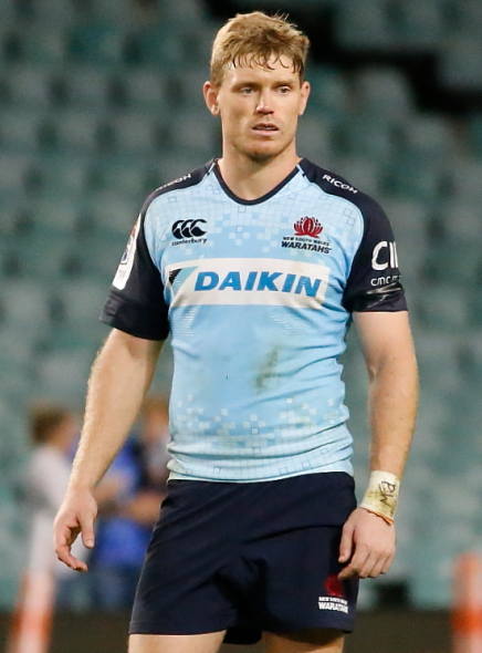 2017.02.25.20.21.22-Bryce Hegarty 10-0001